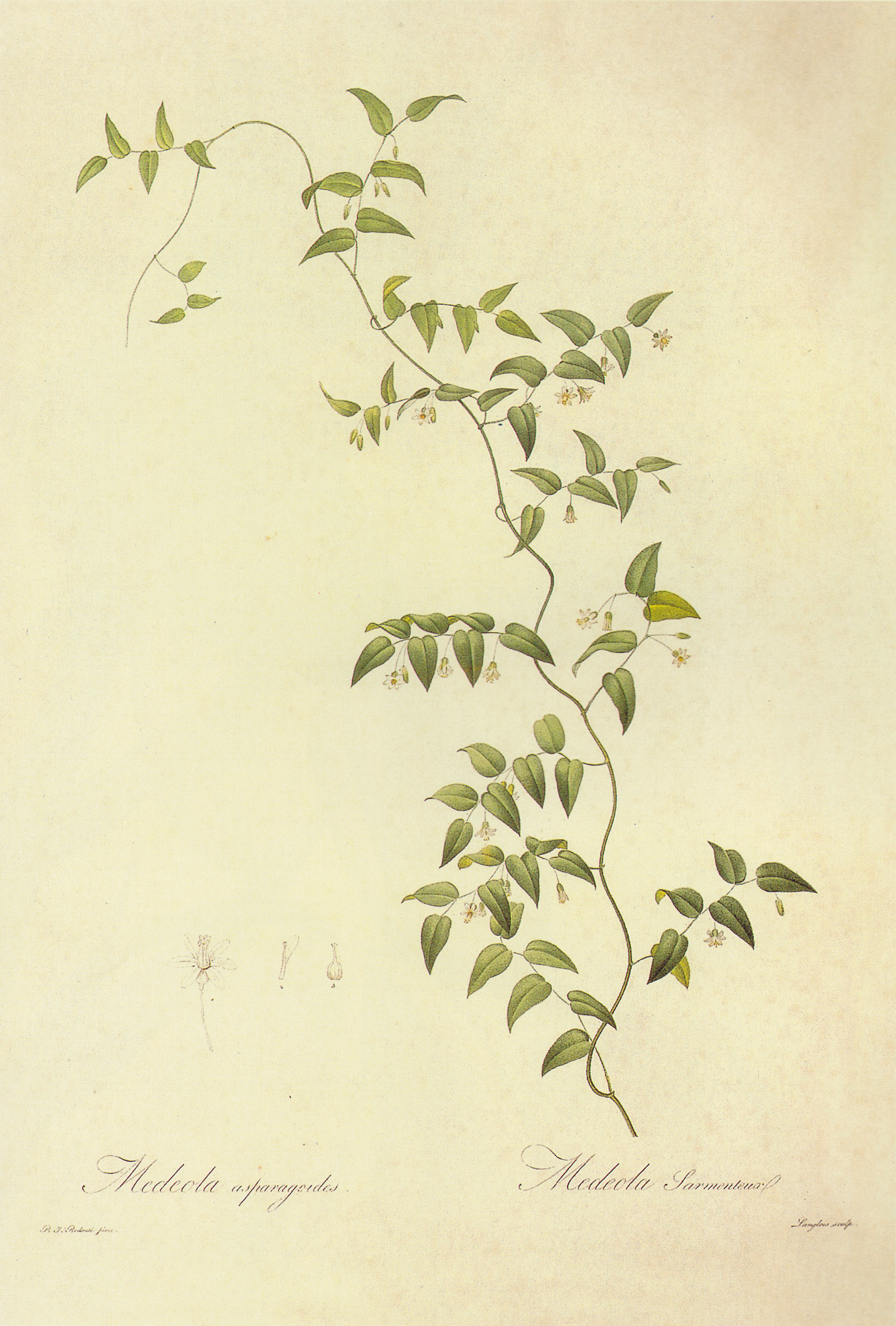 大叶武竹。原产于非洲。